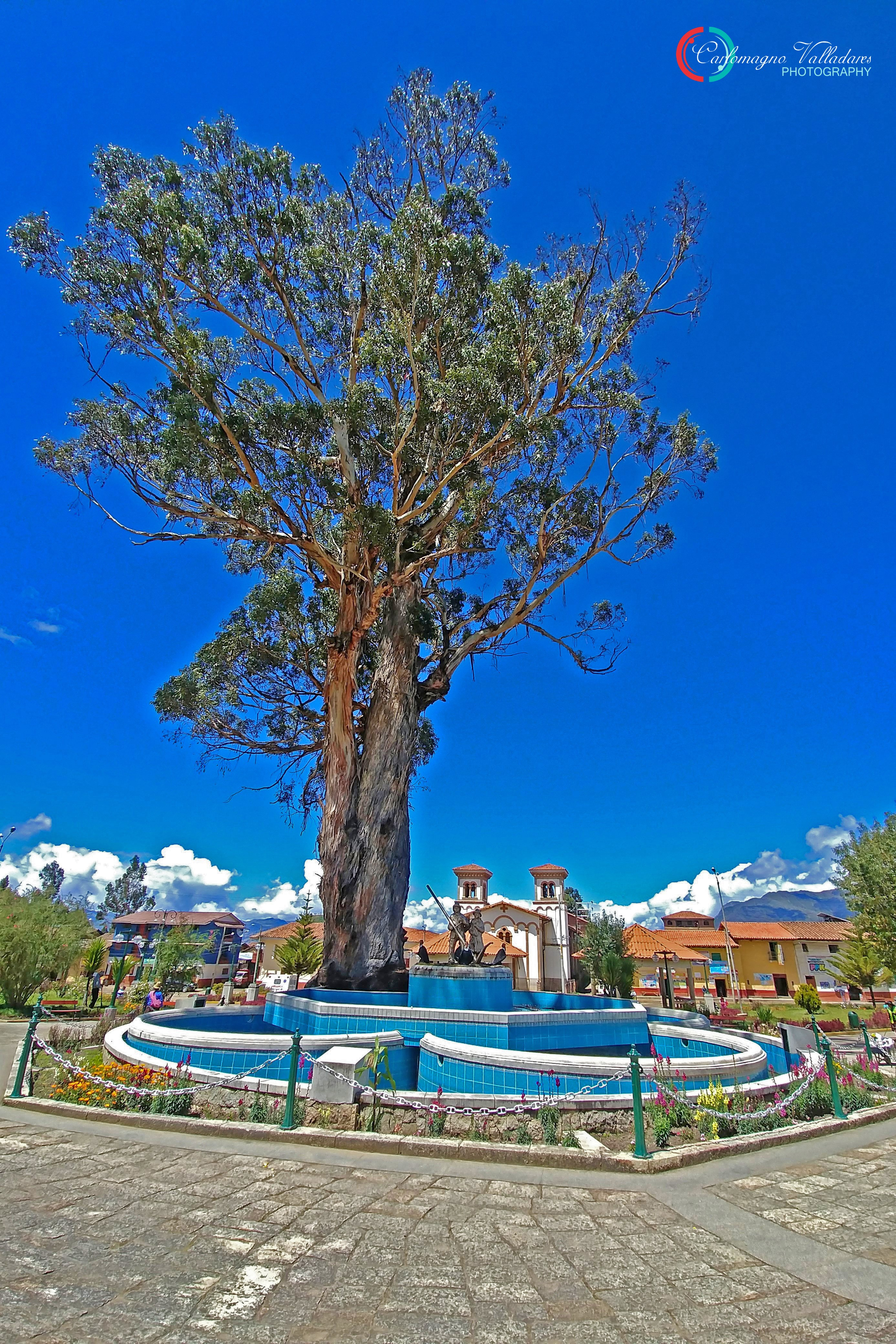 Más de 150 años de antigüedad